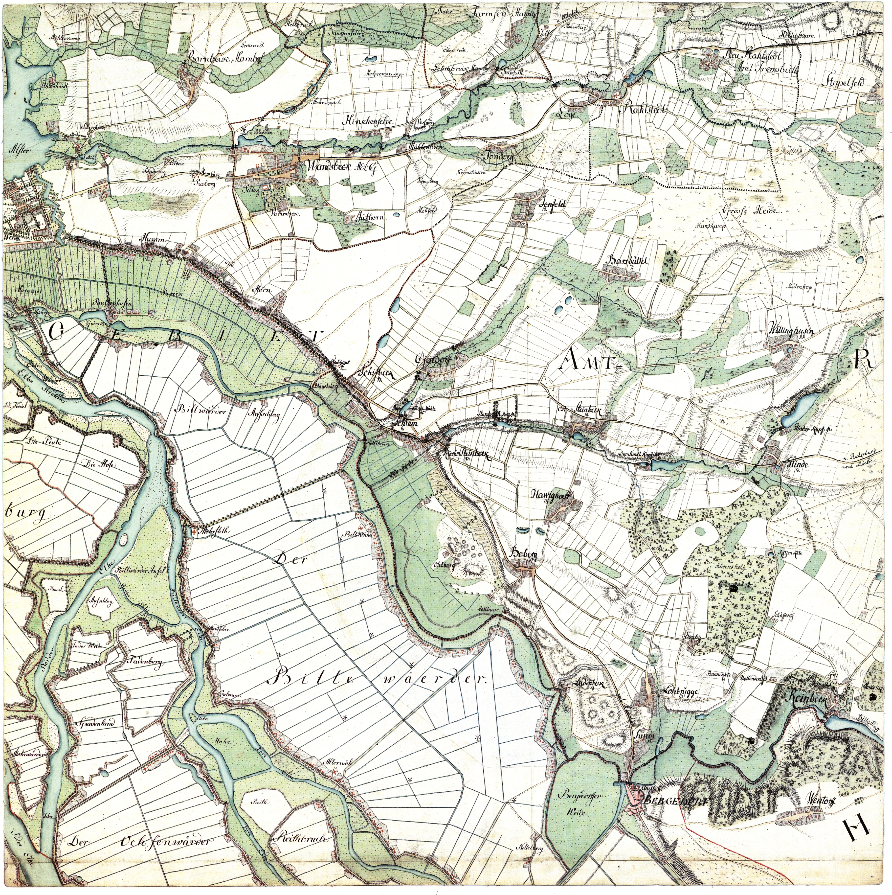 Bergedorf, Reinbek. Aufgenommen in den Jahren 1789 bis 1796 unter der Direktion des Majors Gustav Adolf von Varendorf durch Offiziere des Schleswigschen Infanterieregiments